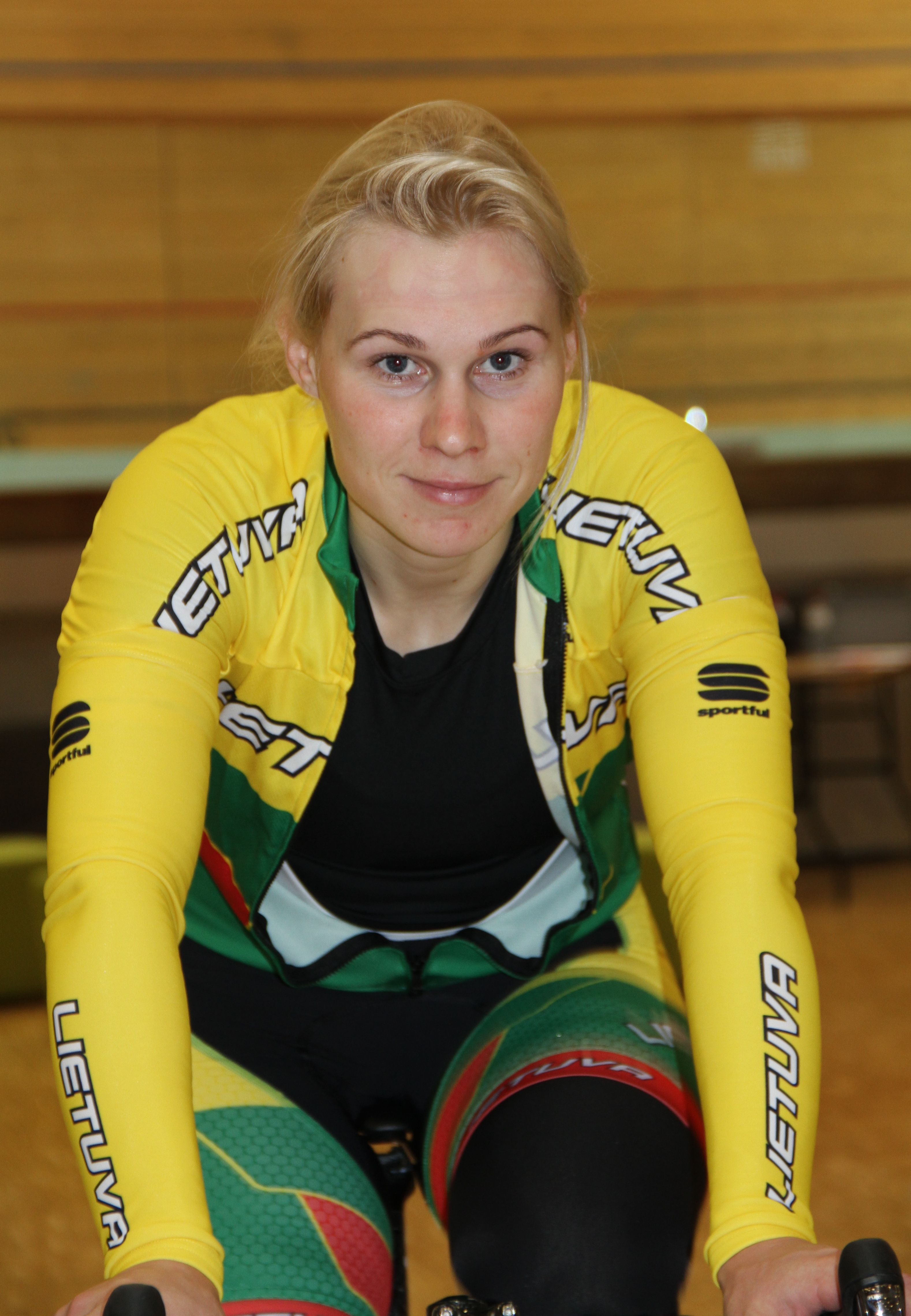 Aušrinė Trebaitė, litauische Radsportlerin The making of this document was supported by the Community-Budget of Wikimedia Germany.